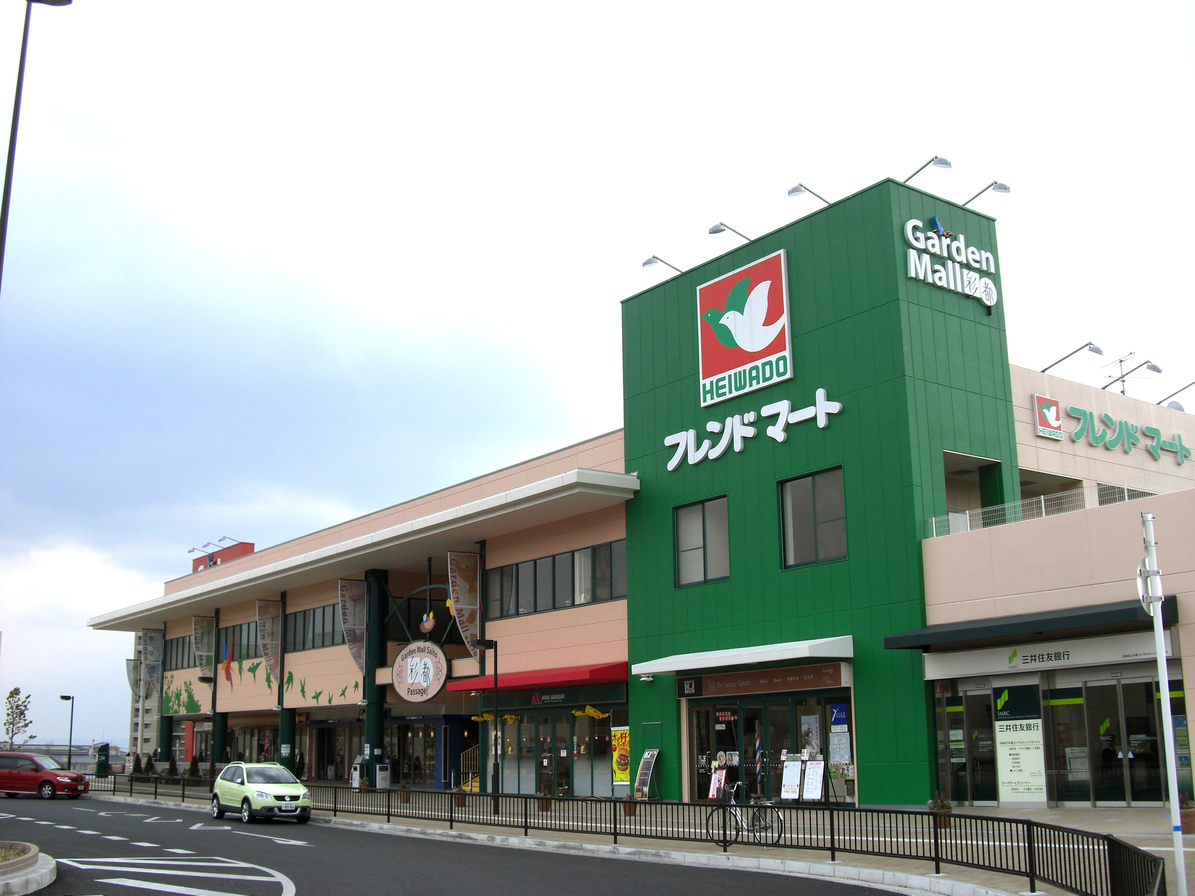 Friendmart Saito,Saito-azagi Ibarakishi-shi Osaka Japan.